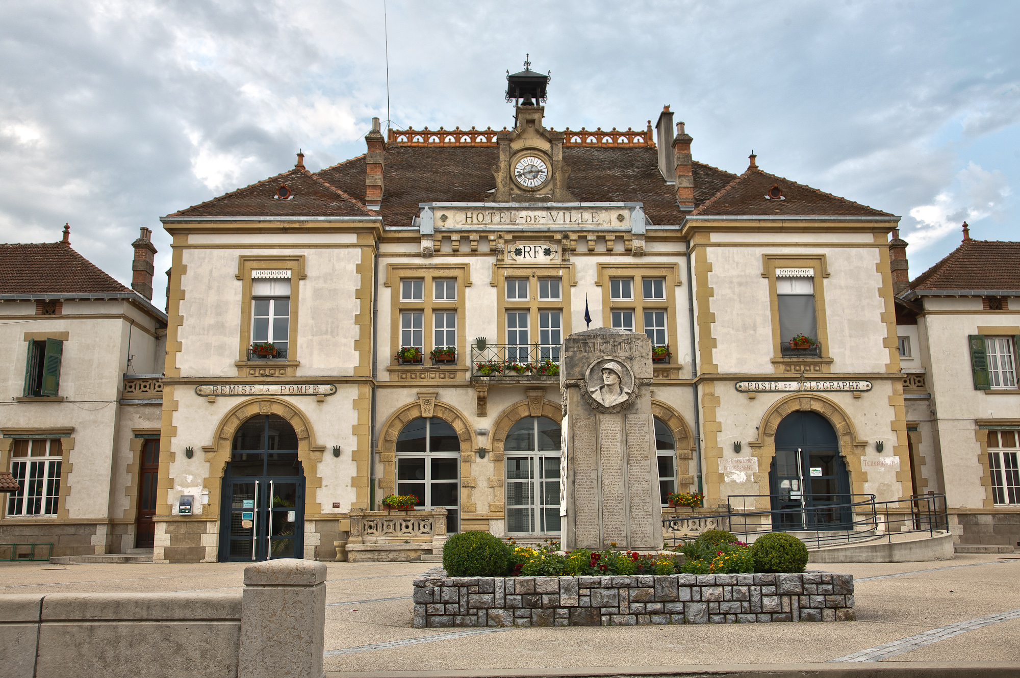 Mairie de Saint Siméon de Bressieux